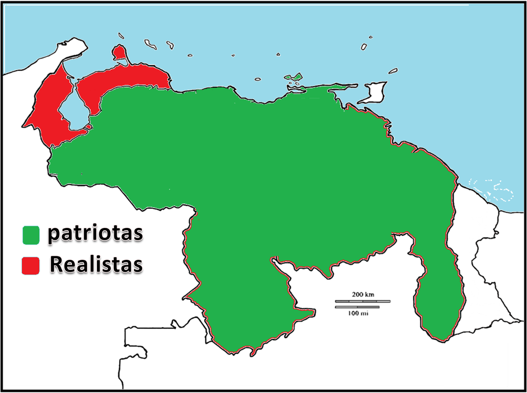 República de Venezuela 1817–1819